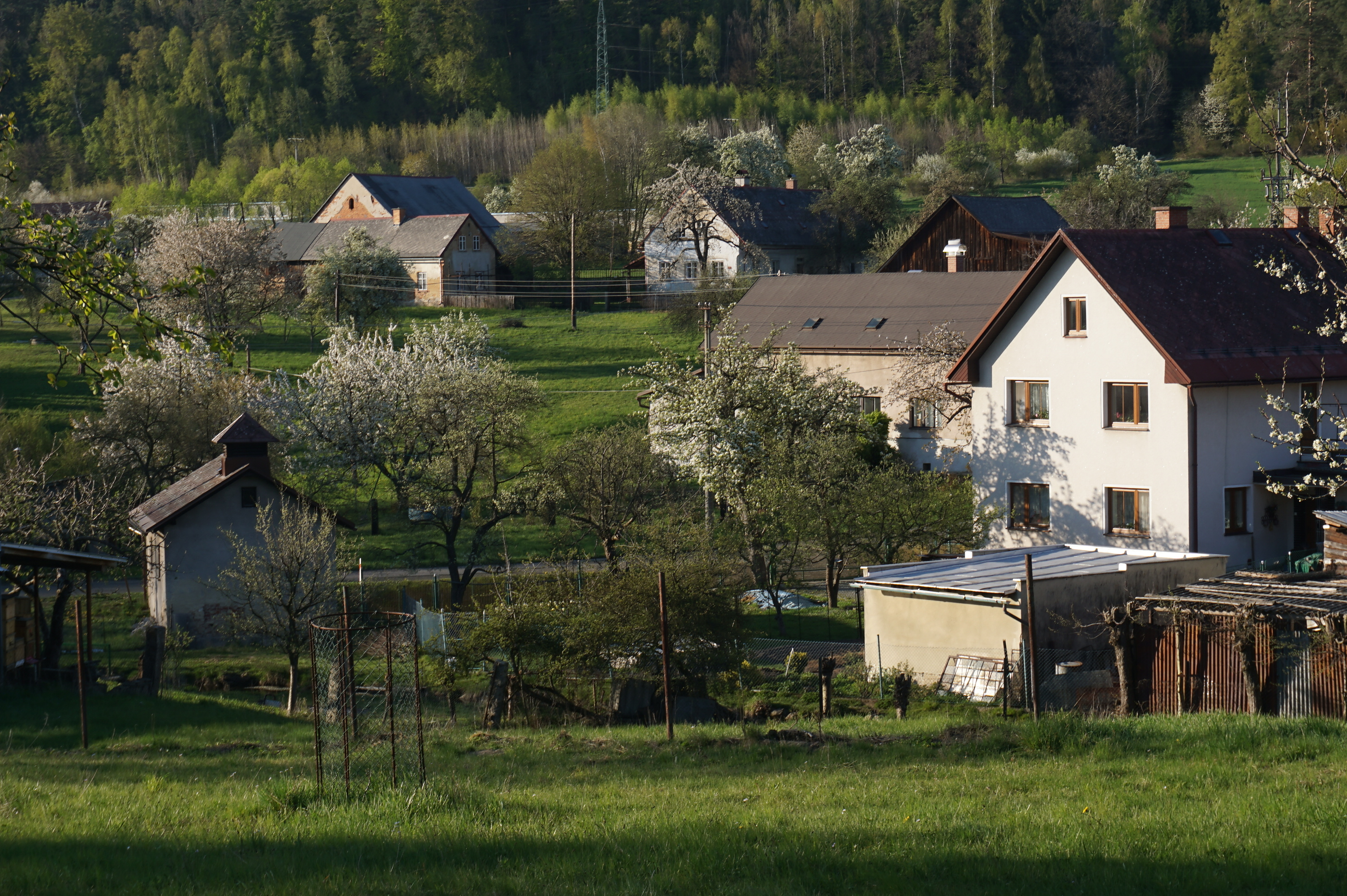 Bezděčín (u Frýdštejna) - pohled do vsi od jihu, v popředí čp. 9, v pozadí areál če. 306 a čp. 12